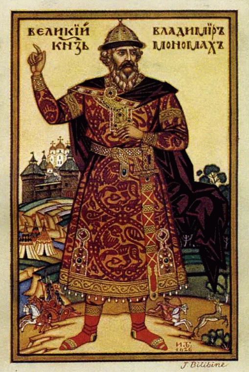 Великий князь Владимир Мономах Carte postale d'Ivan Bilibine (1876-1942) datée 1926. Au dos de la carte " J. Bilibine - "Princes de l'ancienne Russie" Série A n°3 - Wladimir Monomaque (1113-1125) Copyright by Edition Sté "N.P.KARBASNIKOFF" 23, rue de Richelieu, Paris 1er" Ivan Bilibine émigre en 1920 en Egypte mais se fixe en 1925 à Paris où il loue un grand atelier et un appartement boulevard Pasteur à Paris. Bientôt il achète un terrain à la Favière près de Toulon où il cotoie l'été Milioukov, Sacha Tcherny. Peintre et décorateur il travaille pour l'Opéra russe et illustre de nombreux livres (dont des albums du père Castor). En 1934, il fait la connaissance de l'ambassadeur de l'URSS à Paris, M. Potemkine. Il travaille pour l'ambassade soviétique en peignant un décor puis part pour Leningrad avec sa femme en 1936. Il y travaille pour l'opéra, enseigne, réalise des décors. Il meurt lors du blocus de Léningrad pendant la guerre.